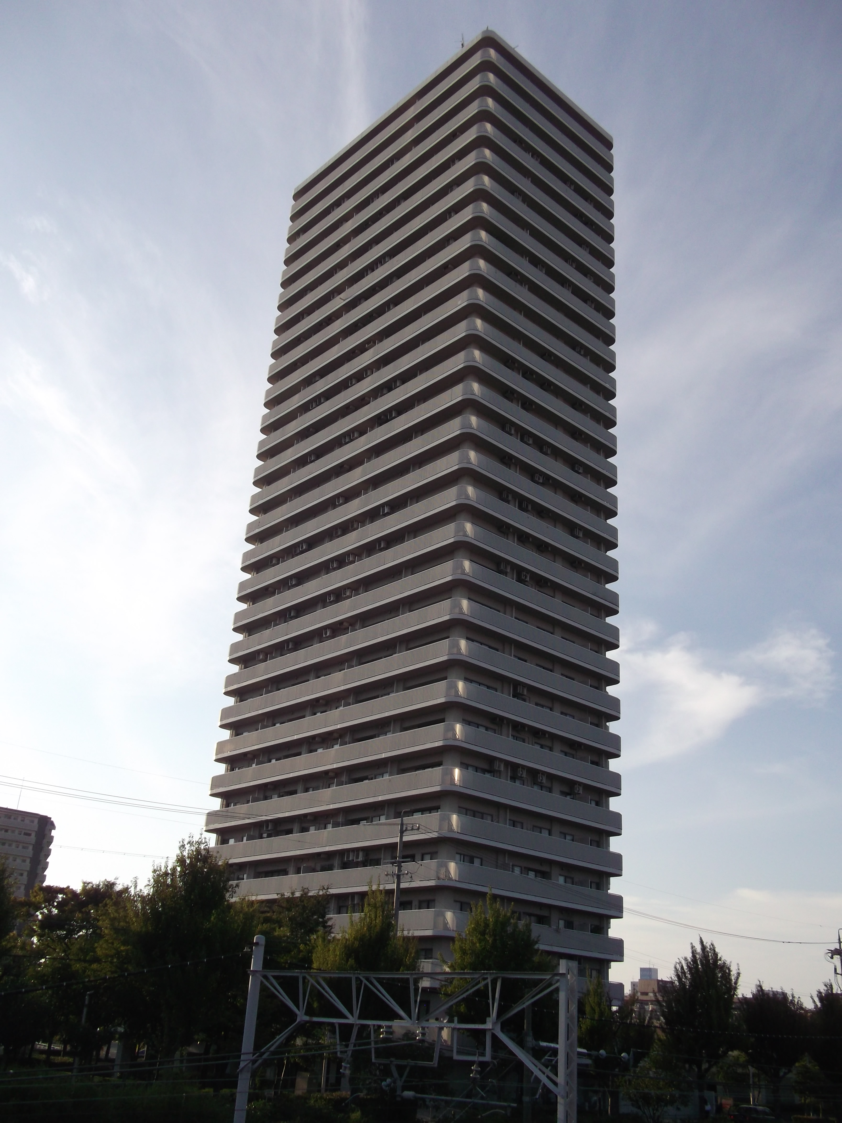 名古屋市東区のザシーン徳川園を南東側より撮影